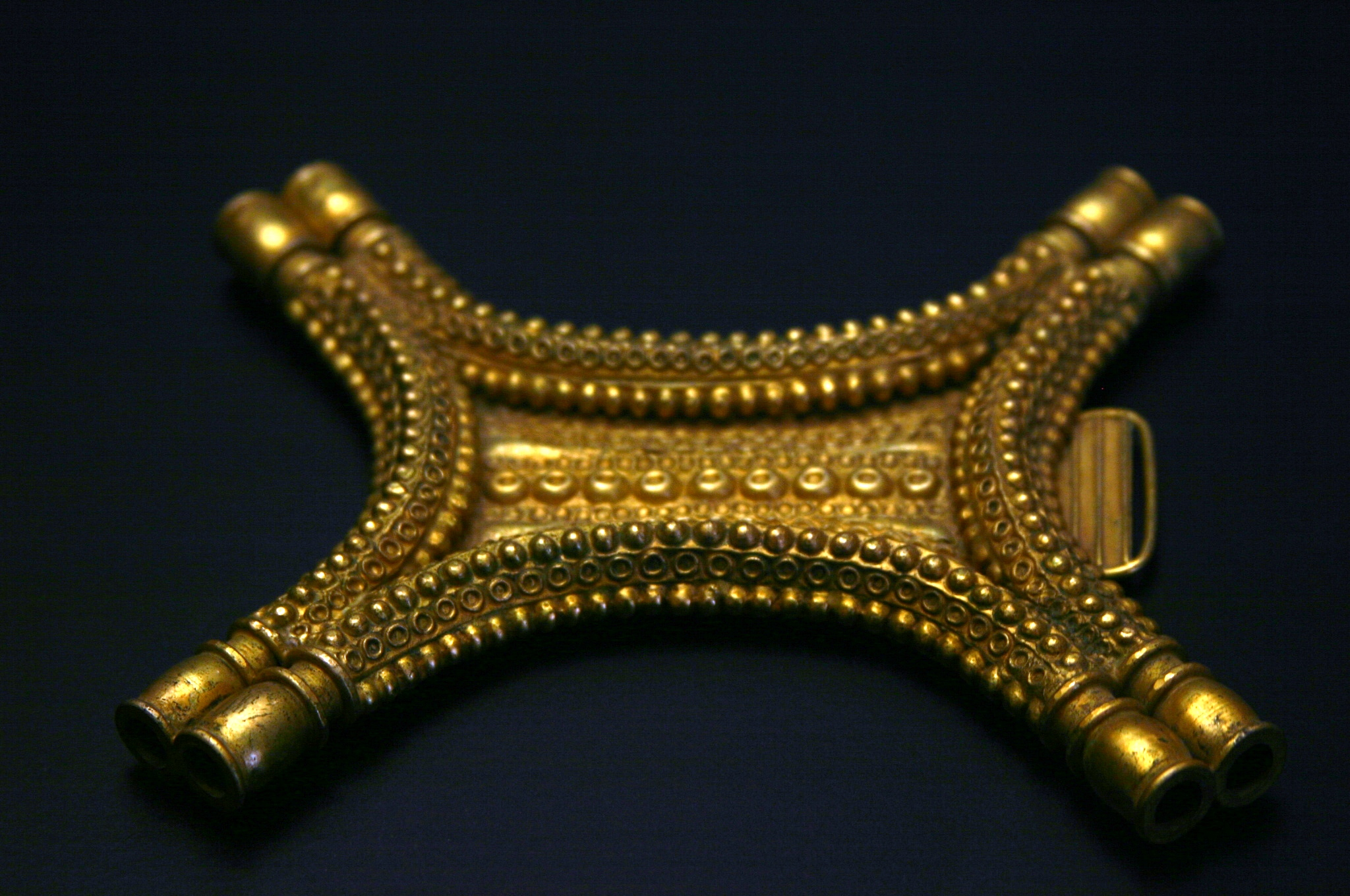 Tesouro Mairena